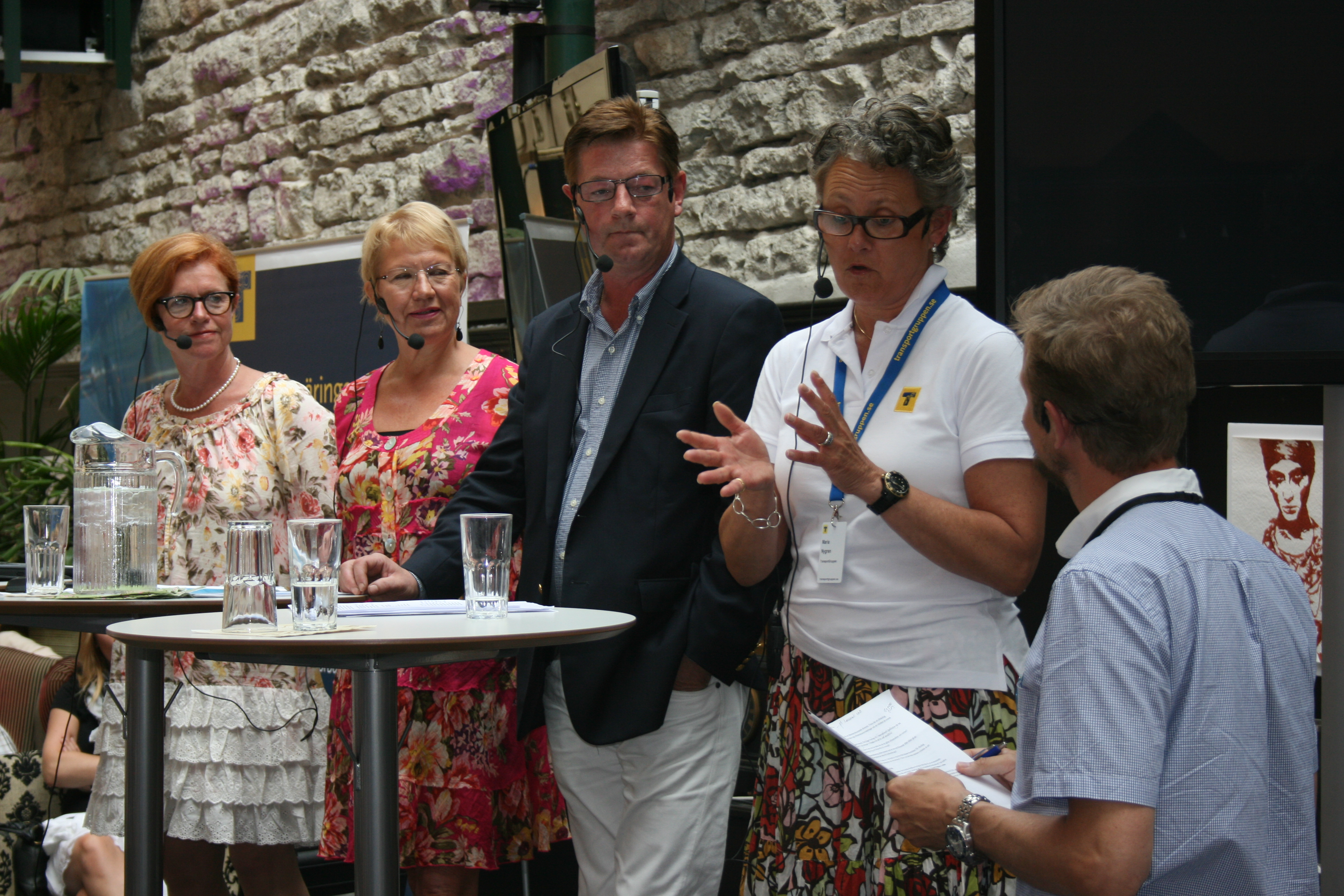 Från vänster: Gotlands landshövding Cecilia Schelin-Seidegård, Yvonne Ingman, vice vd Svensk Handel, Boris Lennerhov, vd Gekås i Ullared och till höger Maria Nygren från TransportGruppen.